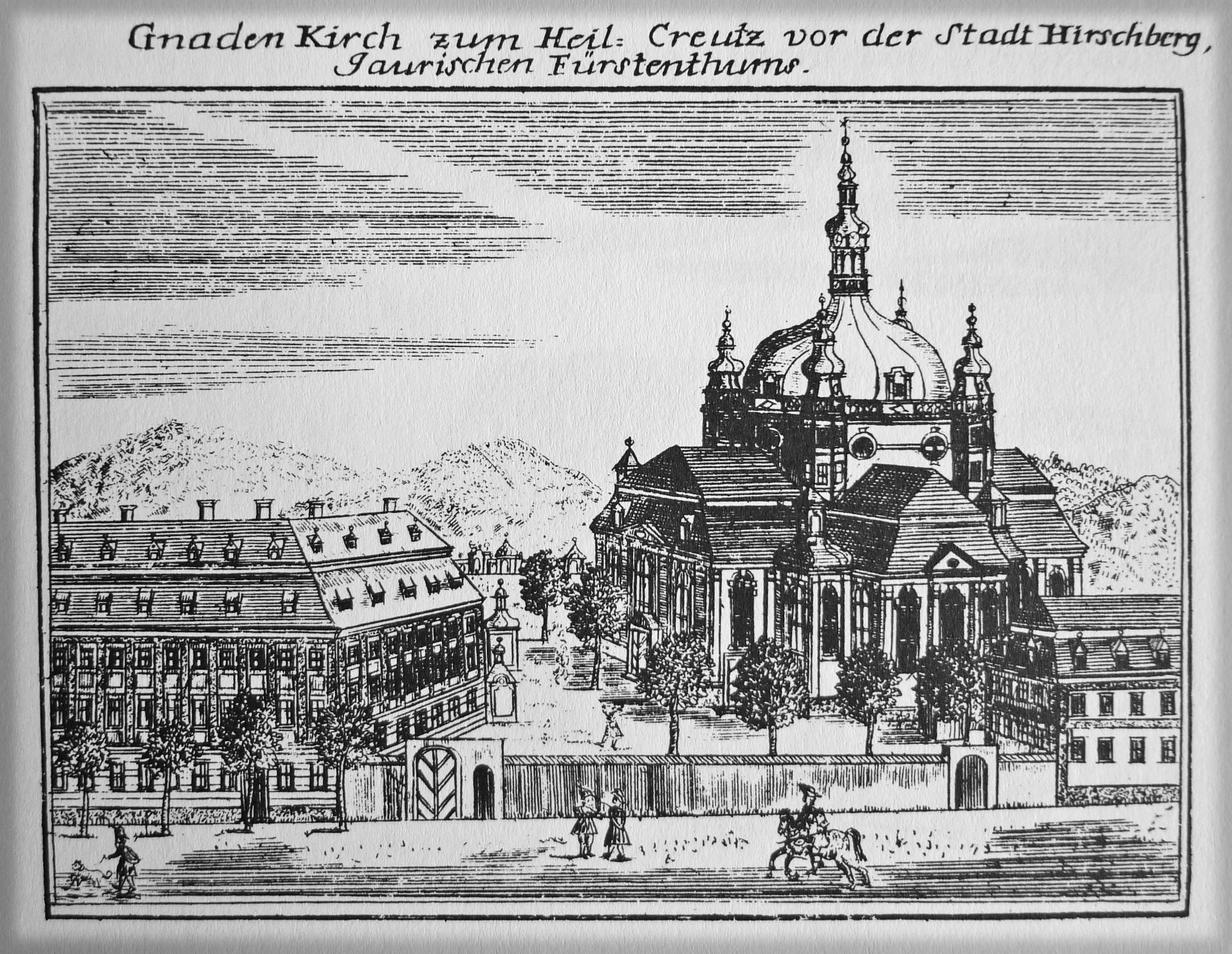 Gnadenkirche in Hirschberg (Schlesien) aus Friedrich Bernhard Werner: Schlesische Bethäuser (1748-52)